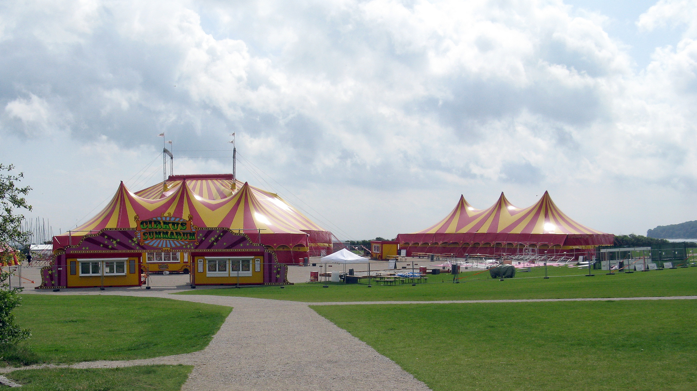 CirkusSummarum på Tangkrogen i Aarhus 2009